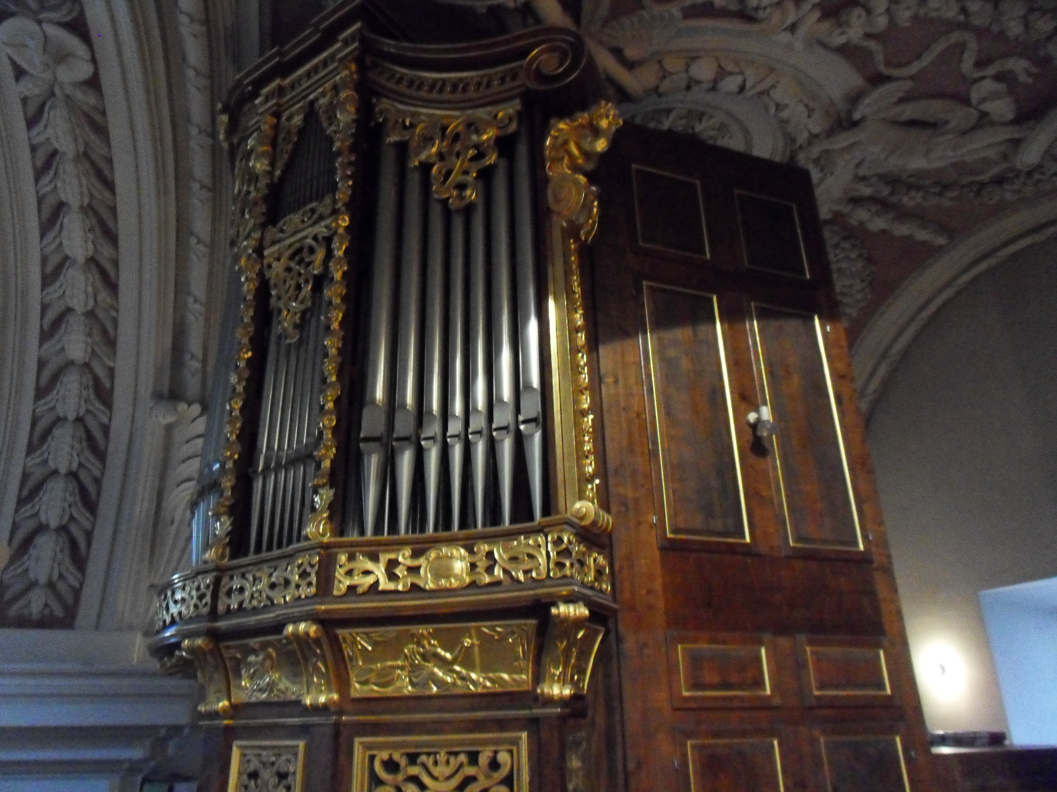 Epistelorgel im St. Stephansdom in Passau